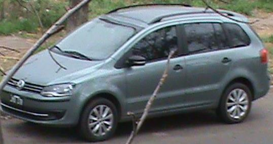 VW Suran línea 2010 en adelante, con restyling de ópticas y llantas